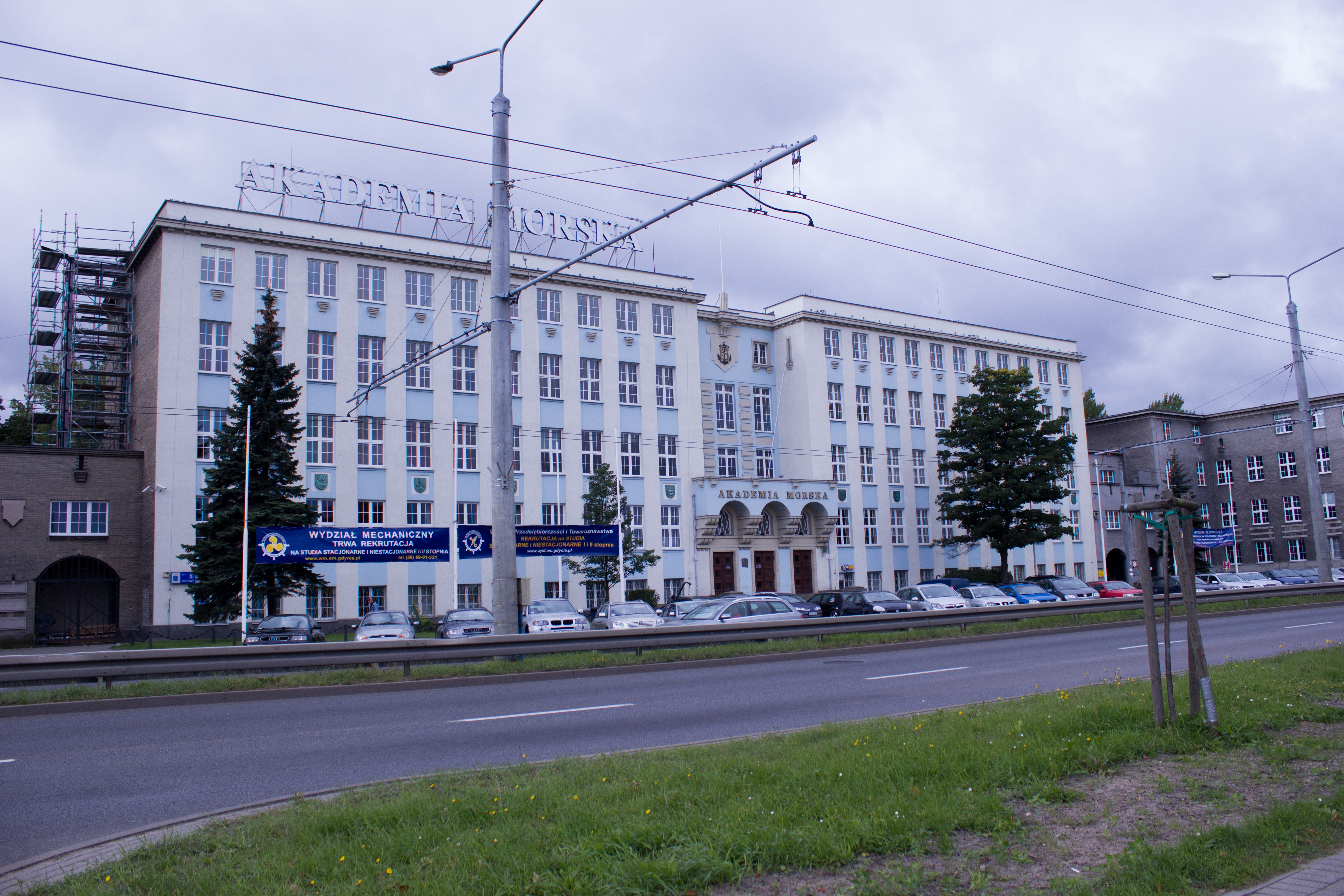 Gdynia, ul. Morska 83 - zespół Wyższej Szkoły Morskiej, obecnie Uniwersytetu Morskiego 1930: gmach główny, budynek administracyjny i laboratorium